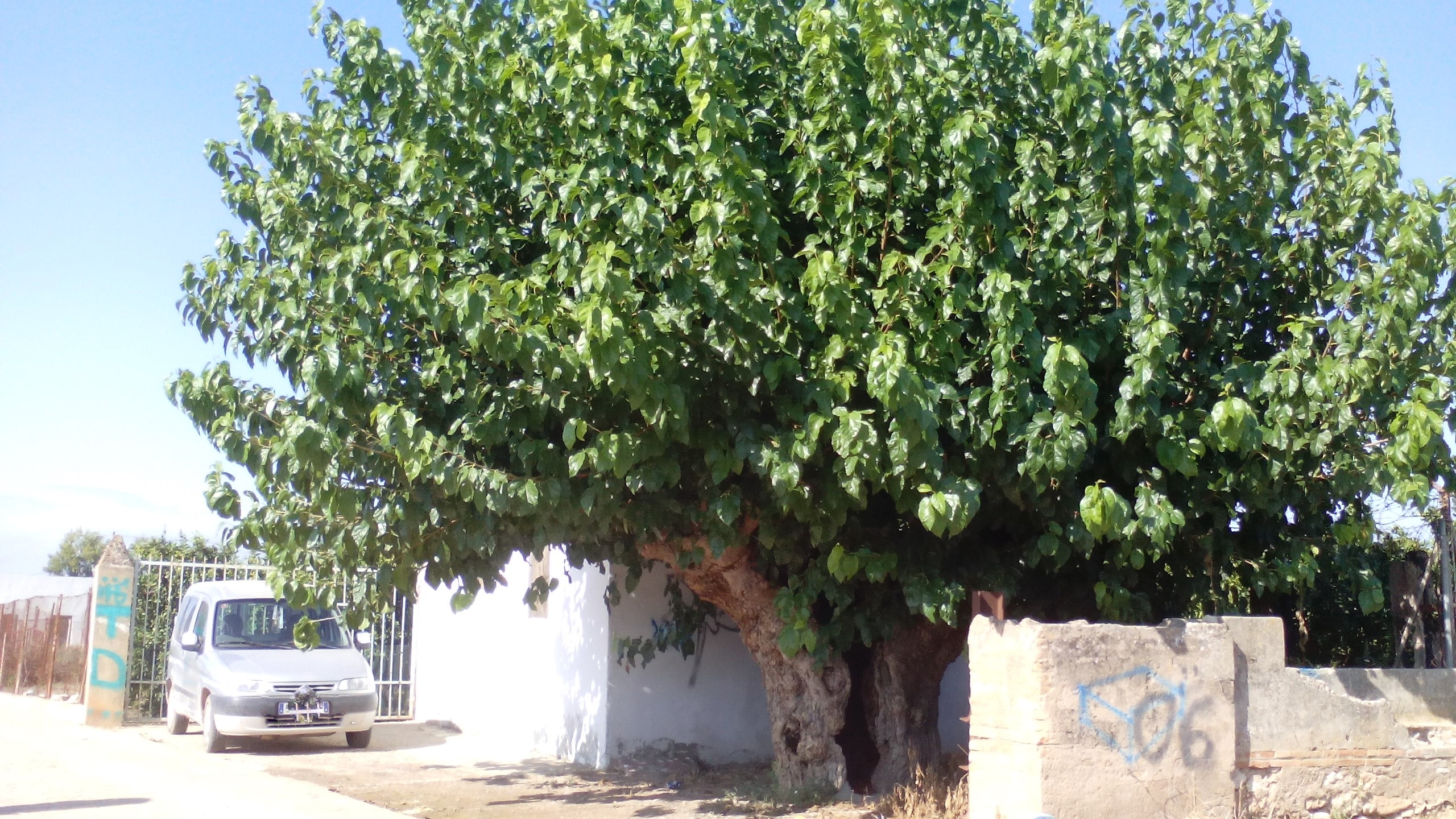 Centenaria morera ubicada en la huerta de Mislata (Valencia) España